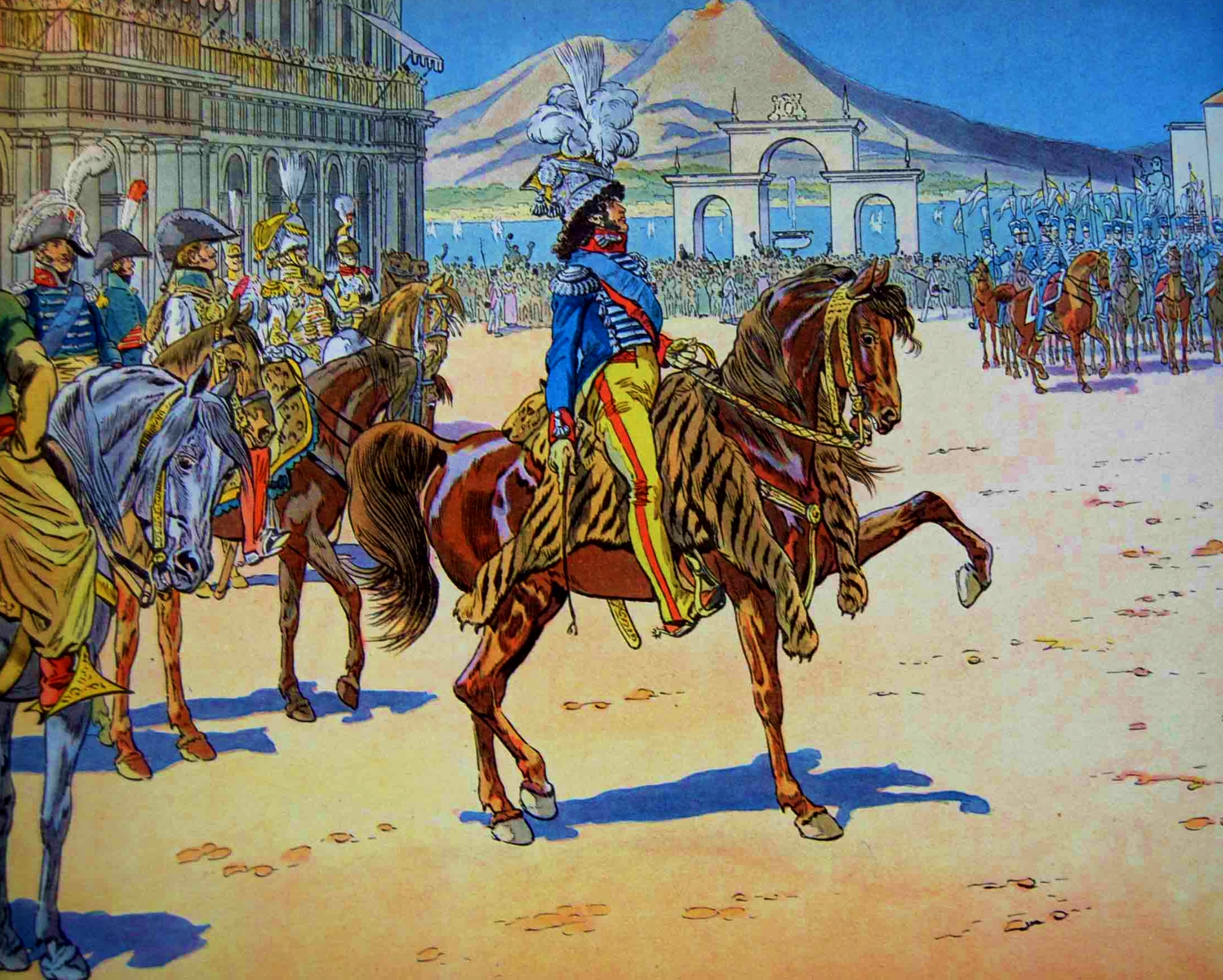 La revue de Naples en 1808. Joachim Murat, roi de Naples, passe ses troupes en revue.